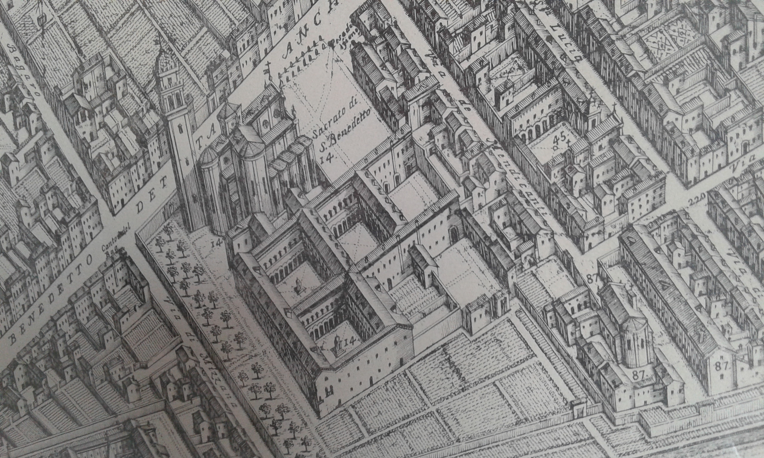 Chiesa e Monastero di S. benedetto